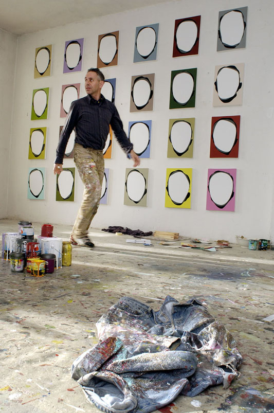 Der Künstler Albrecht Schnider im Jahre 2006 in seinem Atelier.